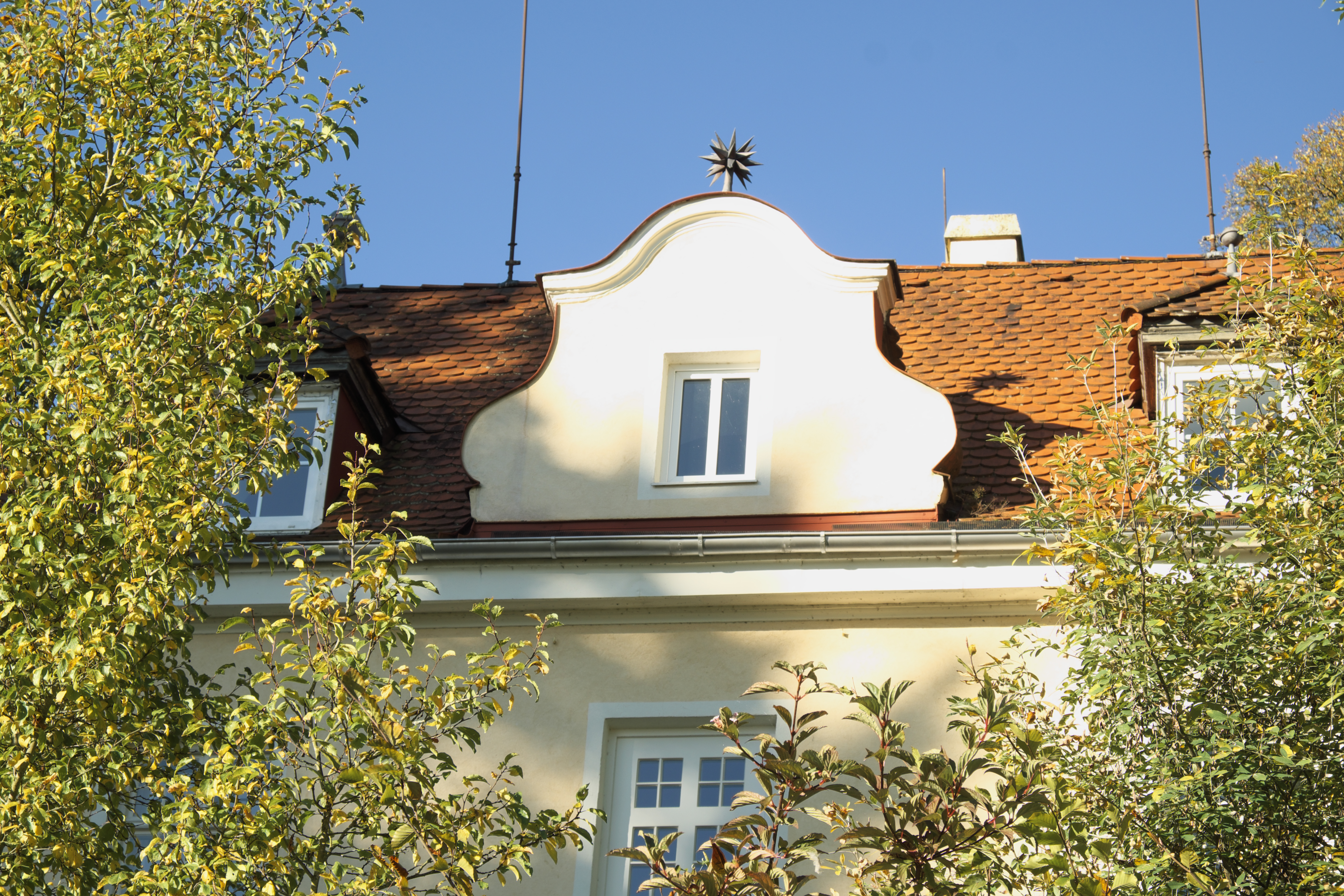 Villa in der Seestraße 30 in Unterschondorf (Schondorf am Ammersee) im Landkreis Landsberg am Lech (Bayern/Deutschland)